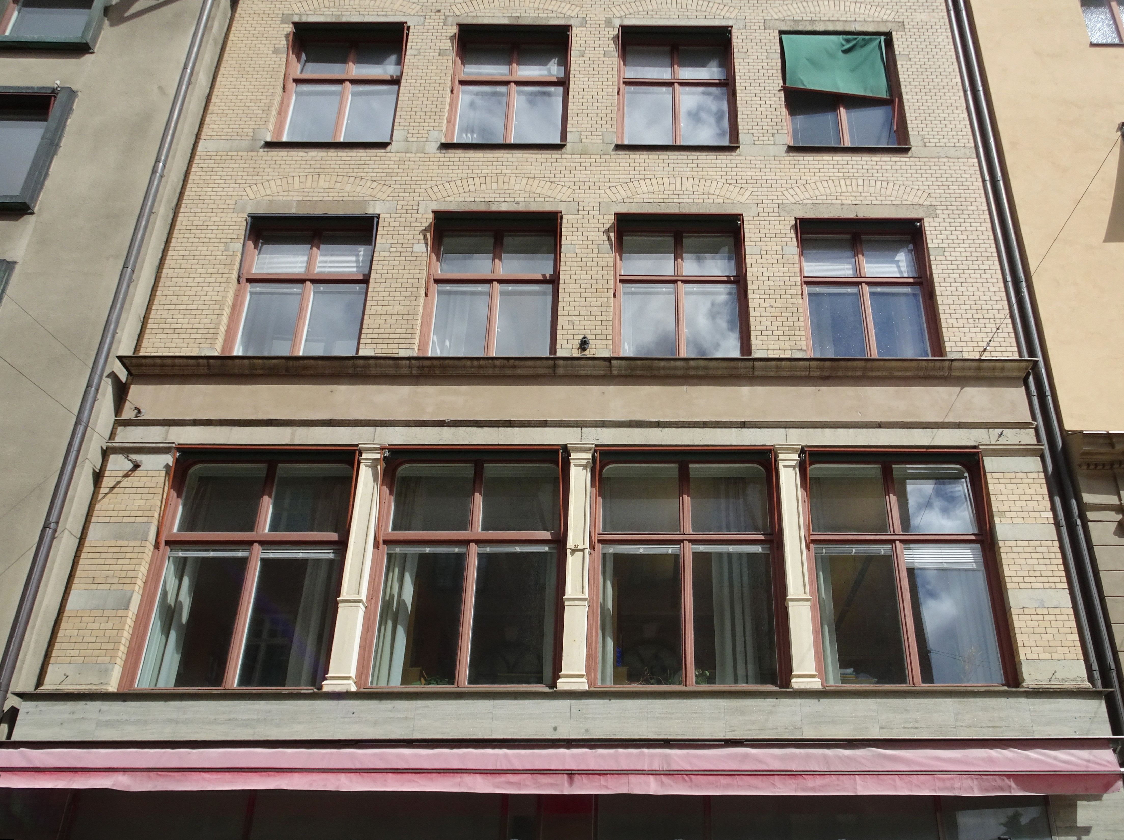 Drottninggatan 12, Kumlienska huset (kvarteret Brunkhuvudet), byggår 1892, Hjalmar Kumlien (Arkitekt).